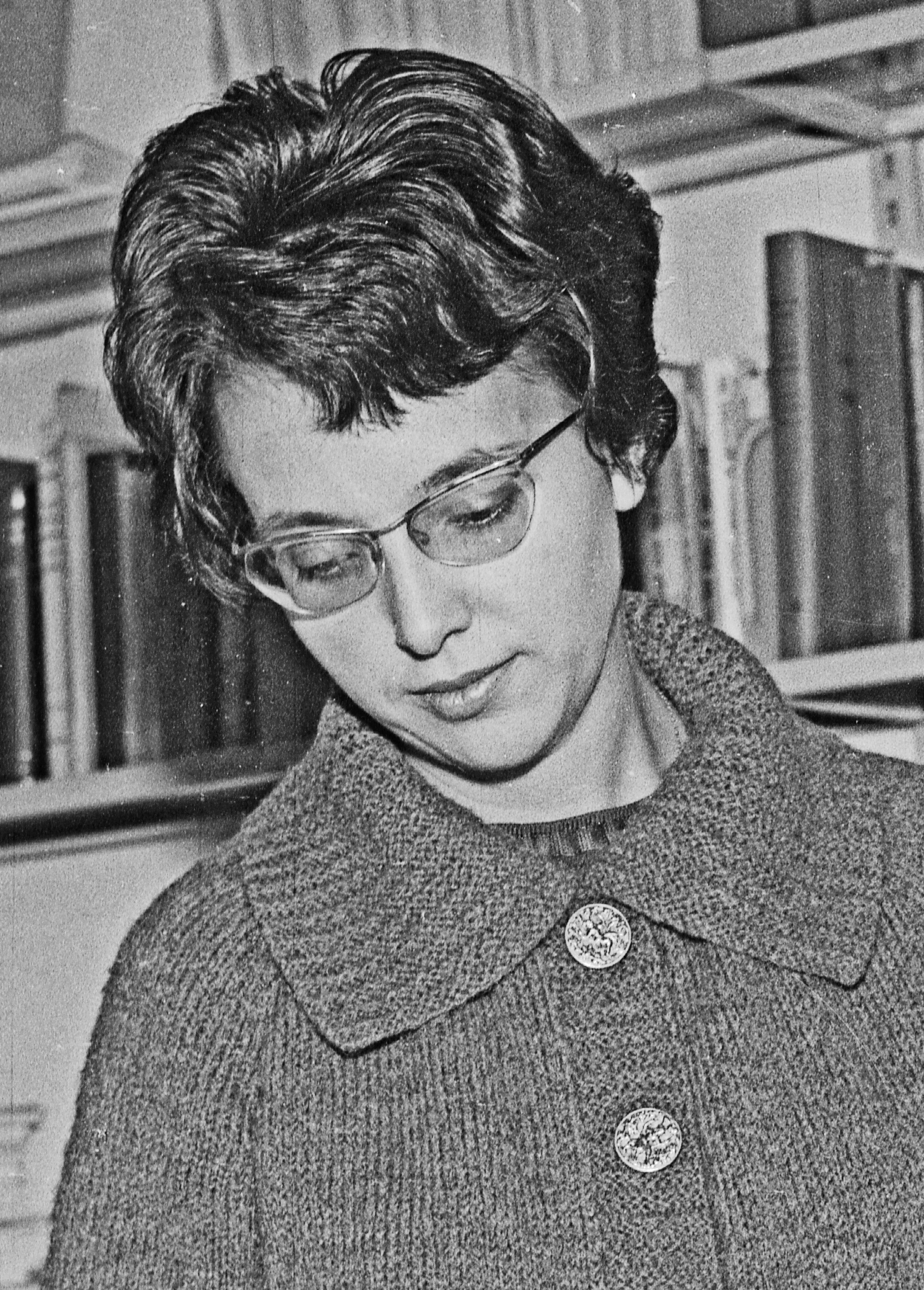 Format: Negativ 120 film Dato / Date: 21 November 1962 Fotograf / Photographer: Eirik Sundvor (1902 - 1992) Sted / Place: Universitetet i Bergen Wikipedia: Sigve Tjøtta (f. 1930) Wikipedia: Jacqueline Naze Tjøtta (f. 1935) Wikipedia: Akustikk Wikipedia: Hydrodynamikk Eier / Owner Institution: Trondheim byarkiv, The Municipal Archives of Trondheim Arkivreferanse / Archive reference: Tor.H43.Bxx.F14432 Merknad: Professorparet Sigve og Jacqueline Tjøtta. Sigve (f. 1930 i Klepp) ble professor i anvendt matematikk i 1962. Jaqueline (f. 1935 i Montpellier) ble i 1966 den første kvinnelige og den yngste noensinne professor ved Det matematisk-naturvitenskapelige fakultetet i Bergen. Paret giftet seg i 1964. TJØTTA Jacqueline Andrée Naze, professor, dr., Bergen, f. 1. juni 1935 i Montpellier, Frankrike, dtr. av musiker Maurize André Naze, f. 1905 og Renée Marie Marthe Courbet, f. 1914. Gift 1964 nedenn. prof. Sigve Tjøtta. Licence es Sciences Univ. i Marseille 1955, Agrégation de Mathématiques 1956, dr. i matematikk Sorbonne 1961. Univ.lærer i Lille, Frankrike 1961, stip. Norges Tekn.-Naturvitensk. Forskningsråd og Univ. i Bergen 1963, prof. i anvendt matem. Univ. i Bergen siden 1966. Skr. vitensk. arb. i kinetisk teori, magneto-hydrodynamikk og teor. akustikk. TJØTTA Sigve, professor, dr. philos., Bergen, f. 1. mars 1930 i Klepp, sønn av bonde Sigvald T., f. 1894 og Anna Maria Hauge (1891-1966). Gift 1964 ovenn. prof. Jacqueline N. Tjøtta. St. 1950, cand. real. 1954, dr. philos. Univ. i Oslo 1960, stud. USA 1956-57, Tyskland 1958-59. Vitensk. ass. og stip. Univ. i Oslo, dosent Univ. i Bergen 1960, prof. i anvendt matem. siden 1963. Skr. vitensk. arb. i teor. akustikk, hydrodynamikk, magneto-hydrodynamikk og teor. plasmafysikk. [Fra Hvem er hvem? 1973]